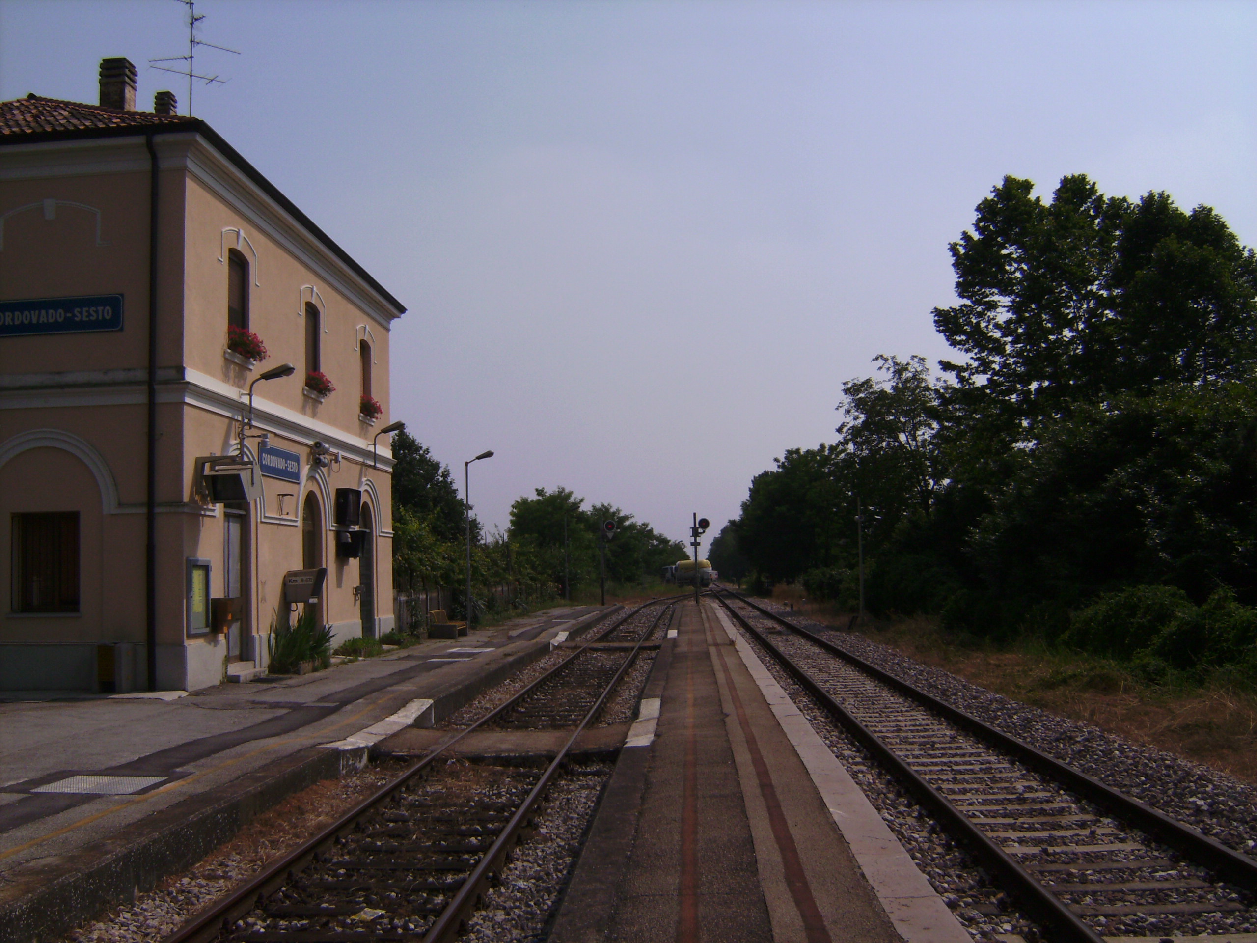 Cordavo-Sesto station